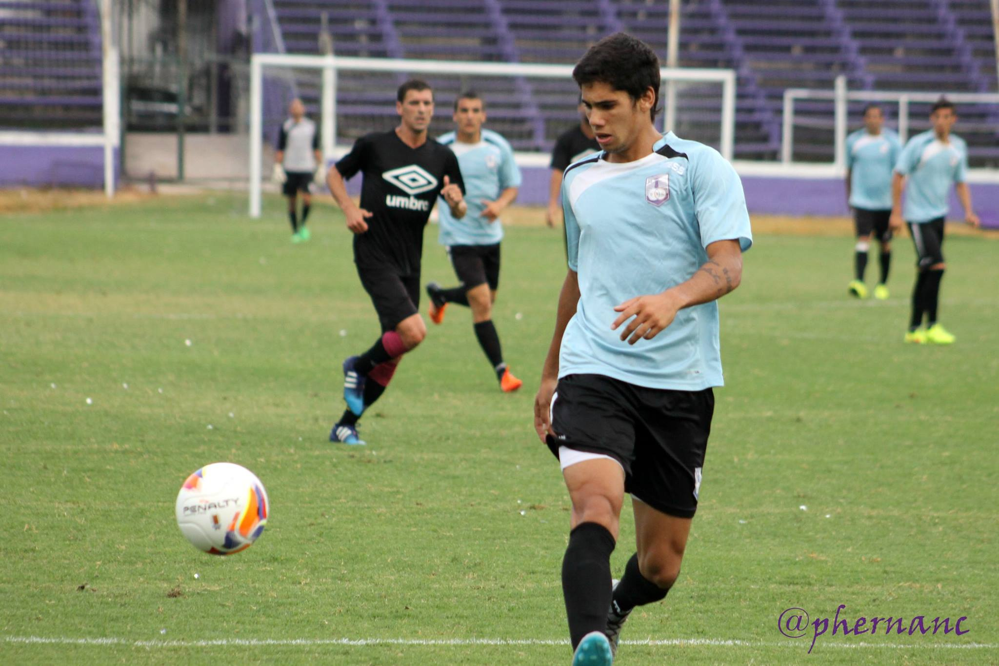 Ayrton durante el entrenamiento